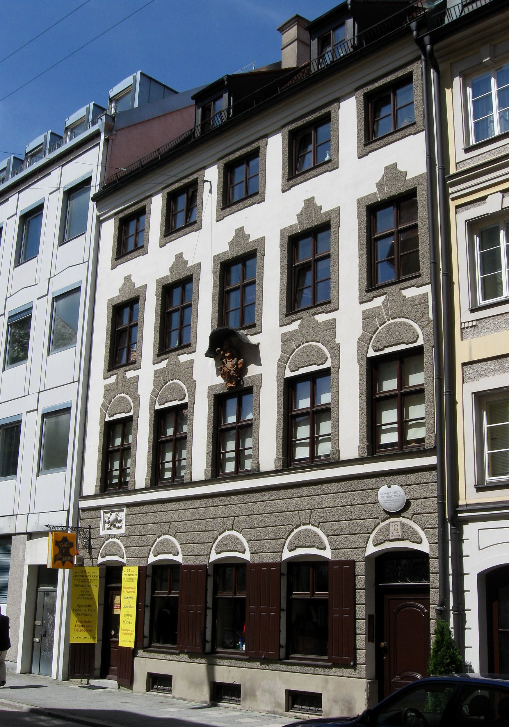 Hackenstraße 10; Haus zur Hundskugel, Altmünchner Bürgerhaus, viergeschossiger Bau mit Putzgliederung, mit Hauszeichen "Hundskugel", entstanden 1741 durch Um- oder weitgehenden Neubau, vielleicht um 1759 verändert; Wohnhaus der Bildhauer Johann Baptist Straub und Roman Anton Boos.